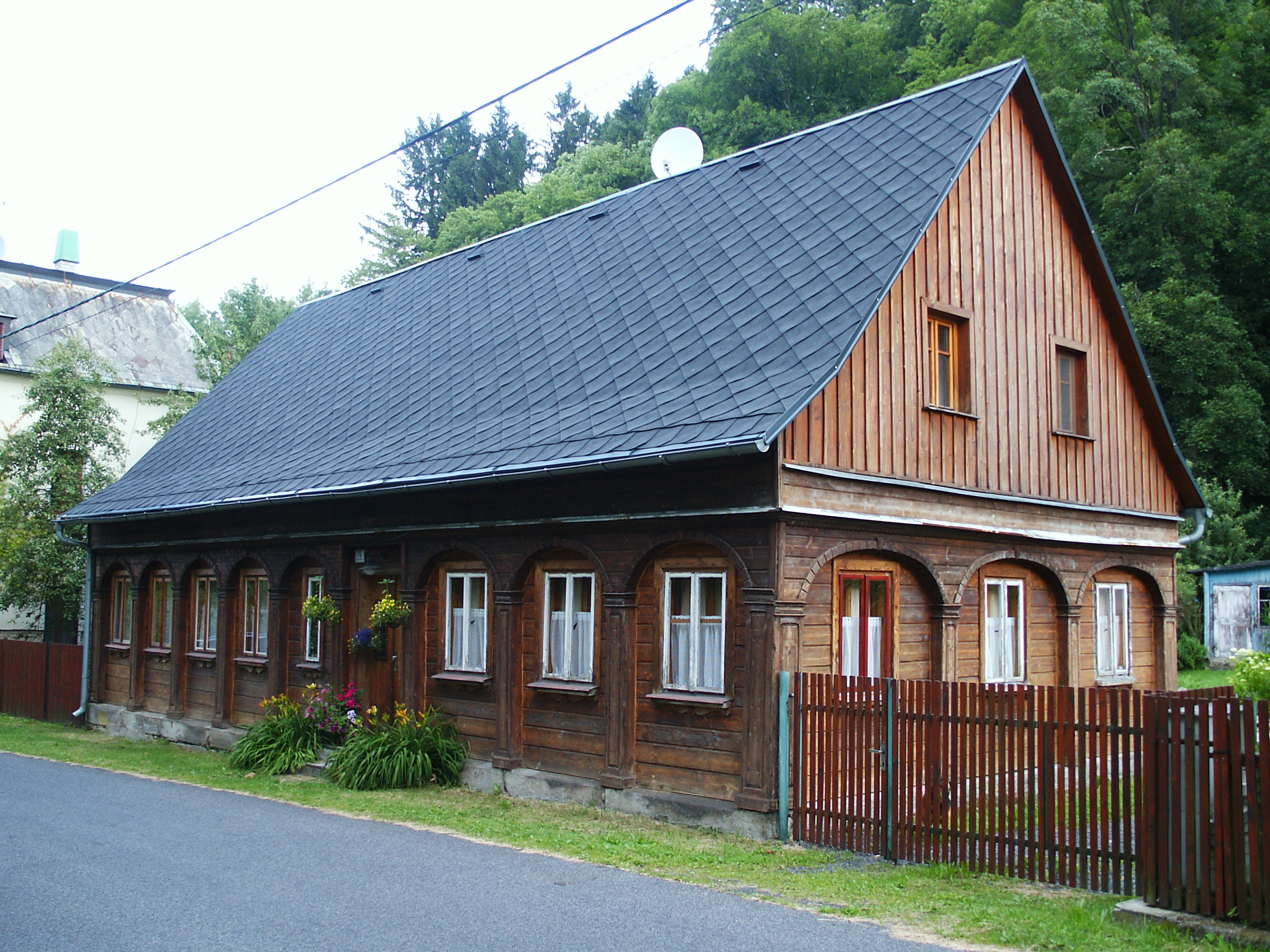 Horní Chřibská - č.p. 75